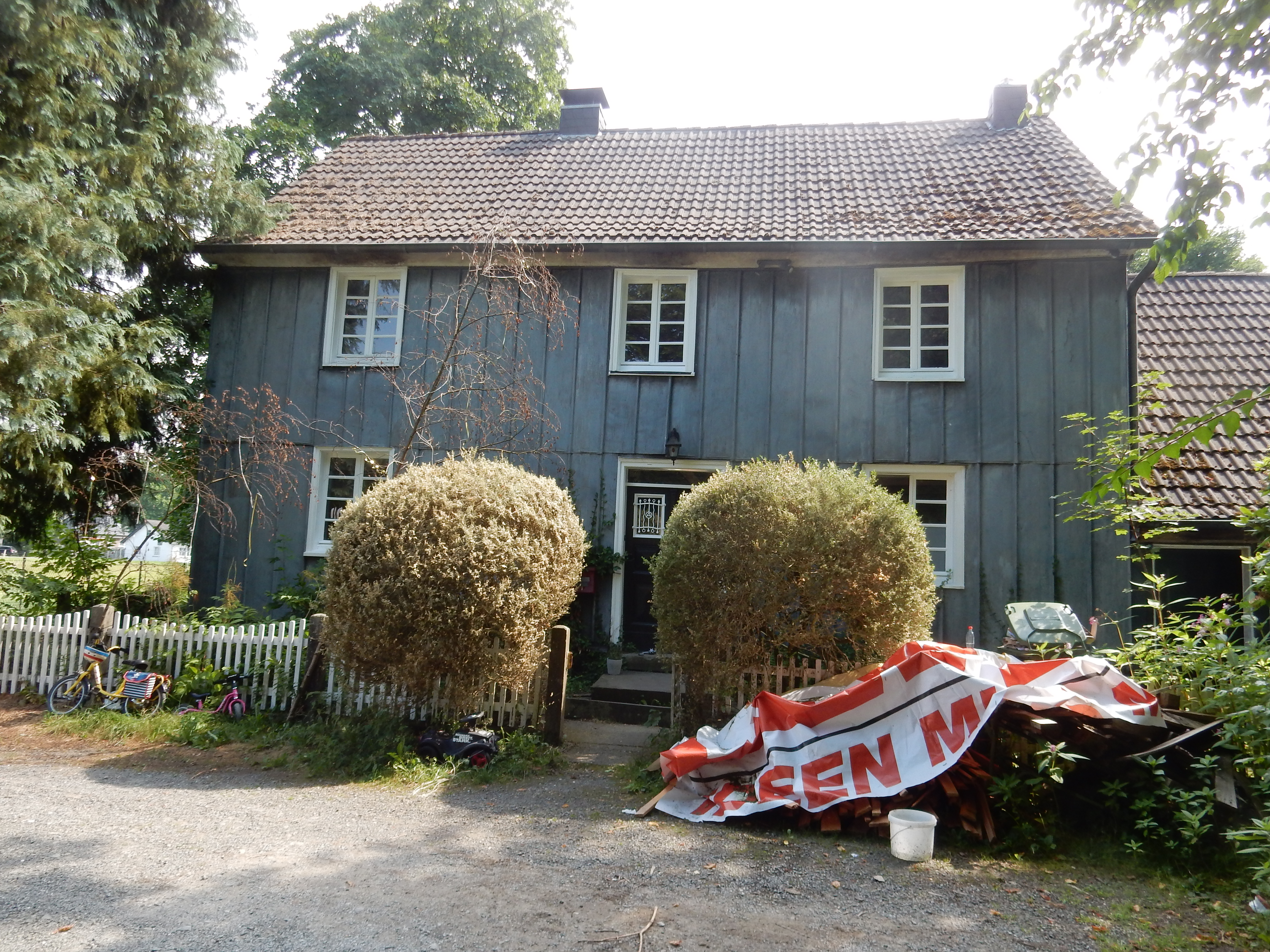 Fachwerkhaus von der Denkmalliste Overath